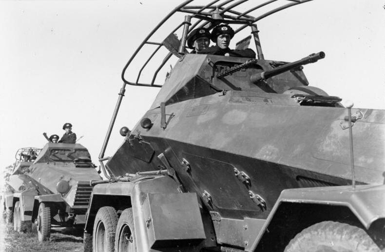 Manöver des VI. Armeekorps in der Lüneburger Heide vom 2. bis 7. September 1935, gepanzerte Kampfwagen Information added by Wikimedia users.Spähpanzer Im Vordergrund Pz-Spw. (6 Rad) (Fu) (Sd.Kfz. 232), dahinter Pz.Spw. (6 Rad) (Sd.Kfz. 231)